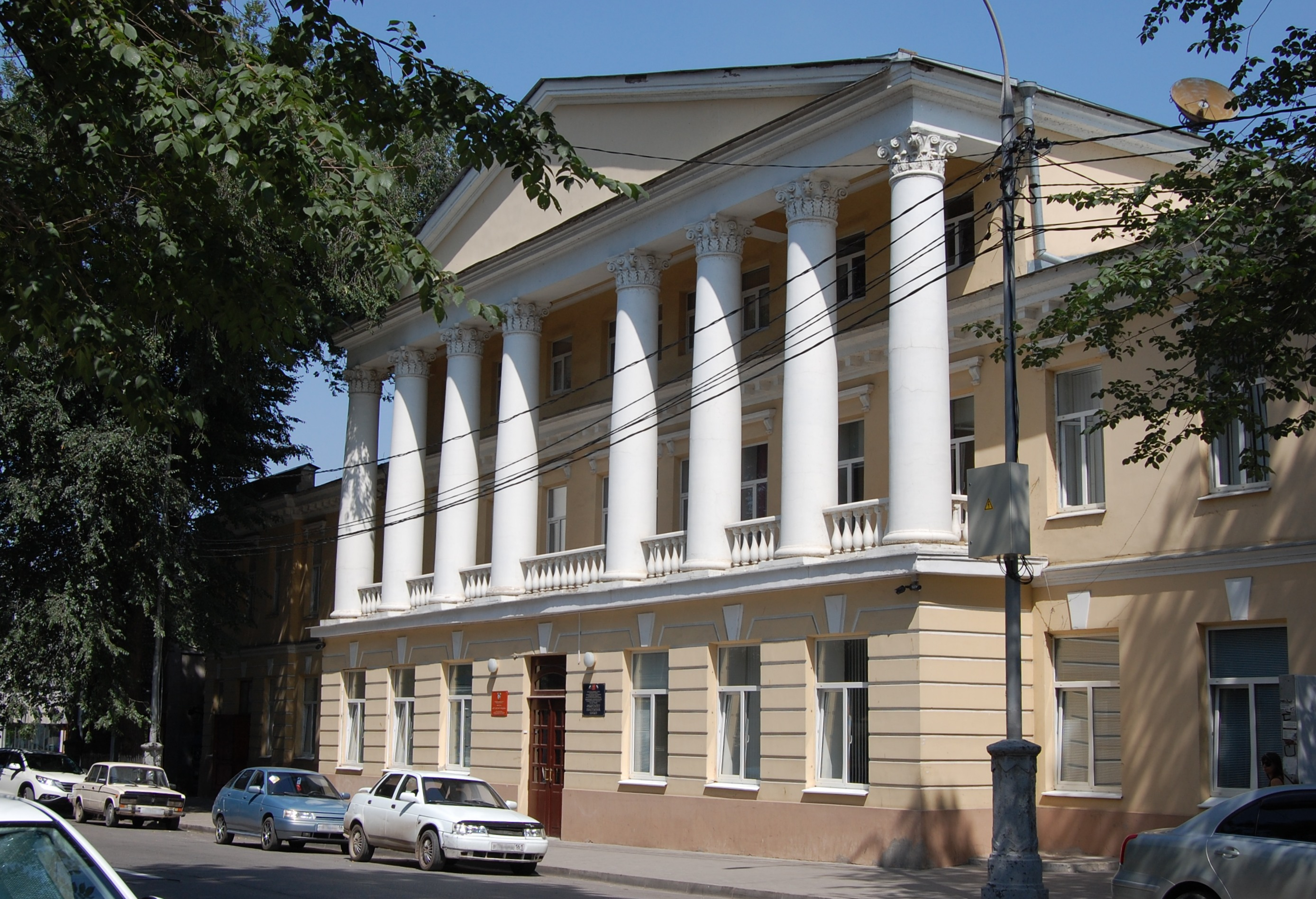 Таганрогский государственный педагогический институт, здание факультета иностранных языков. Таганрог, ул. Петровская, 68.